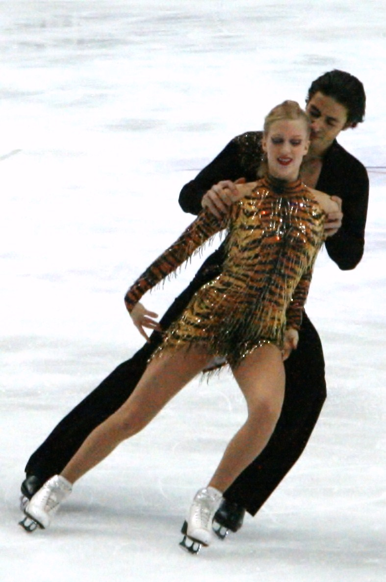 Кэйтлин Уивер и Эндрю Поже на Кубке Ростелекома 2011. Короткий танец - латина.